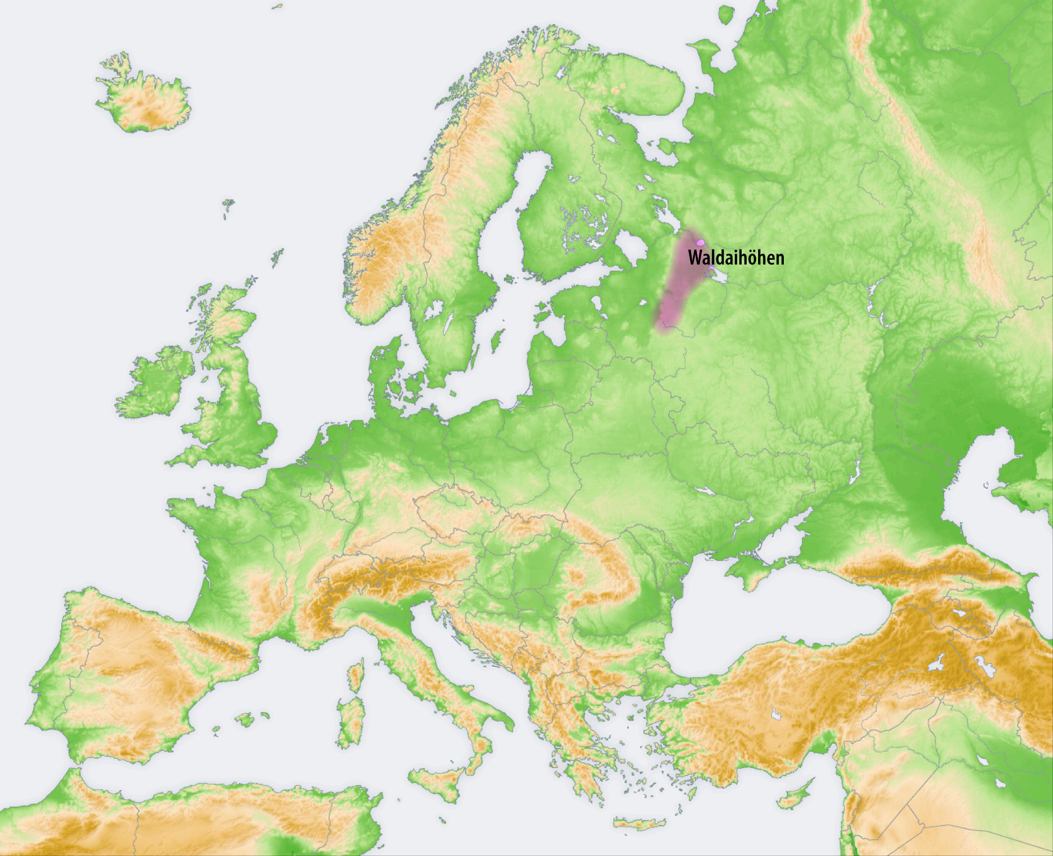 Landschaften der Osteuropäischen Ebene: Waldaihöhen